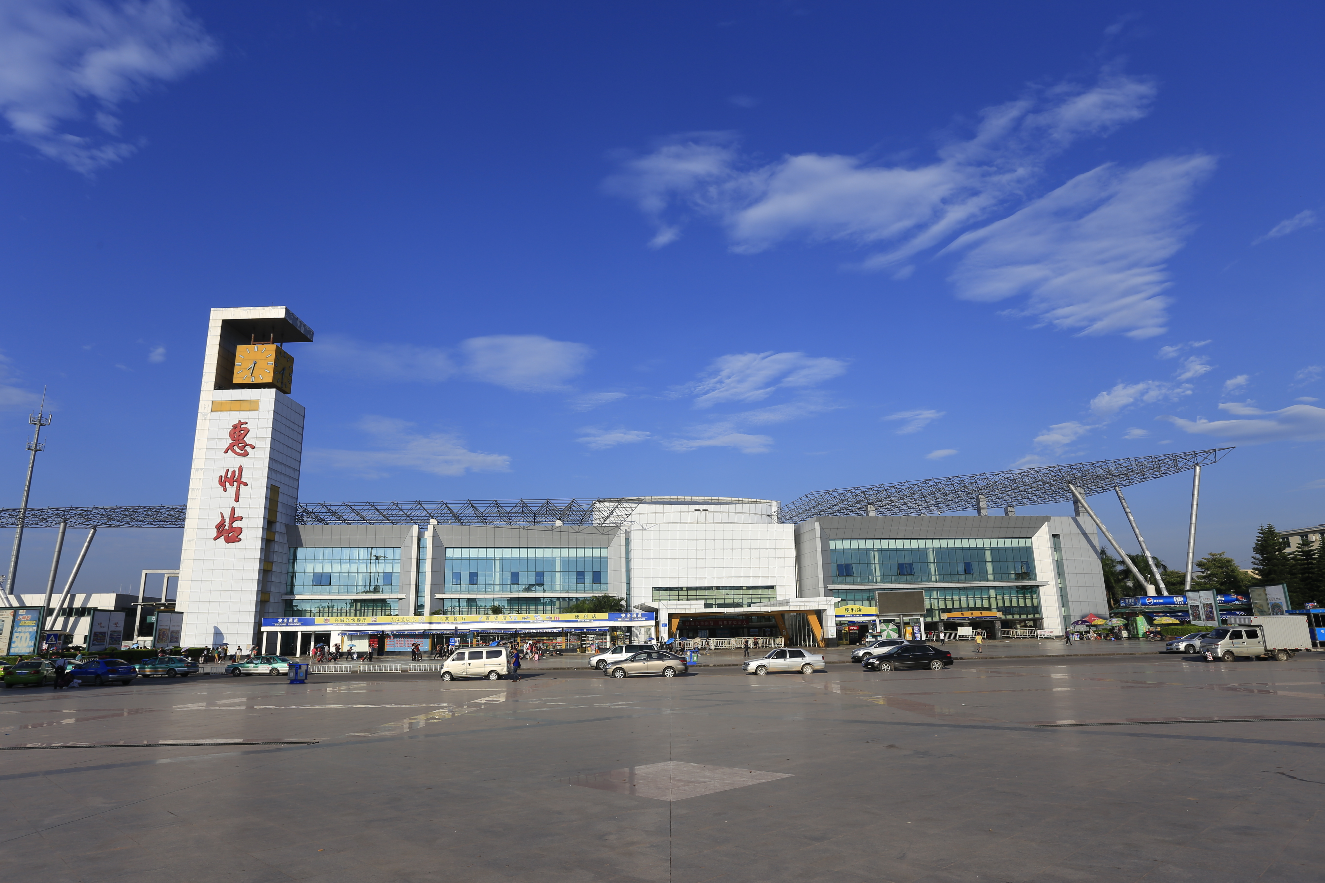 惠州站